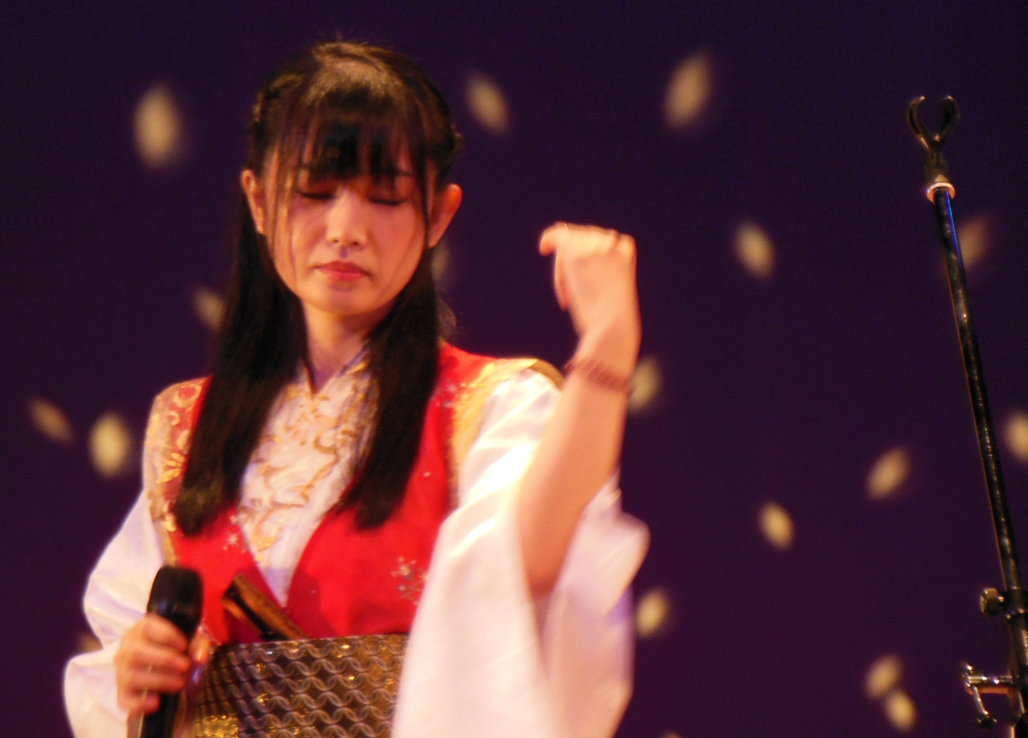 小栗さくら（さくらゆき）